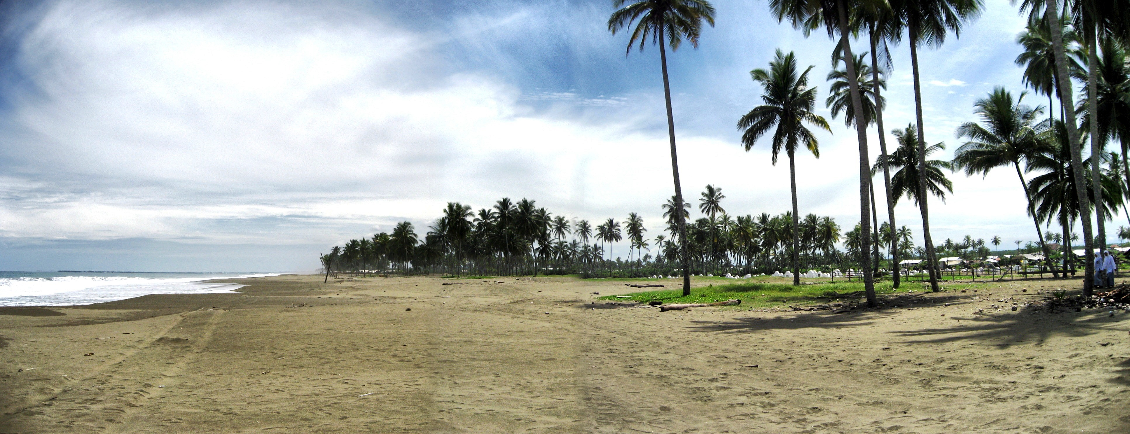 Pantai Meulaboh